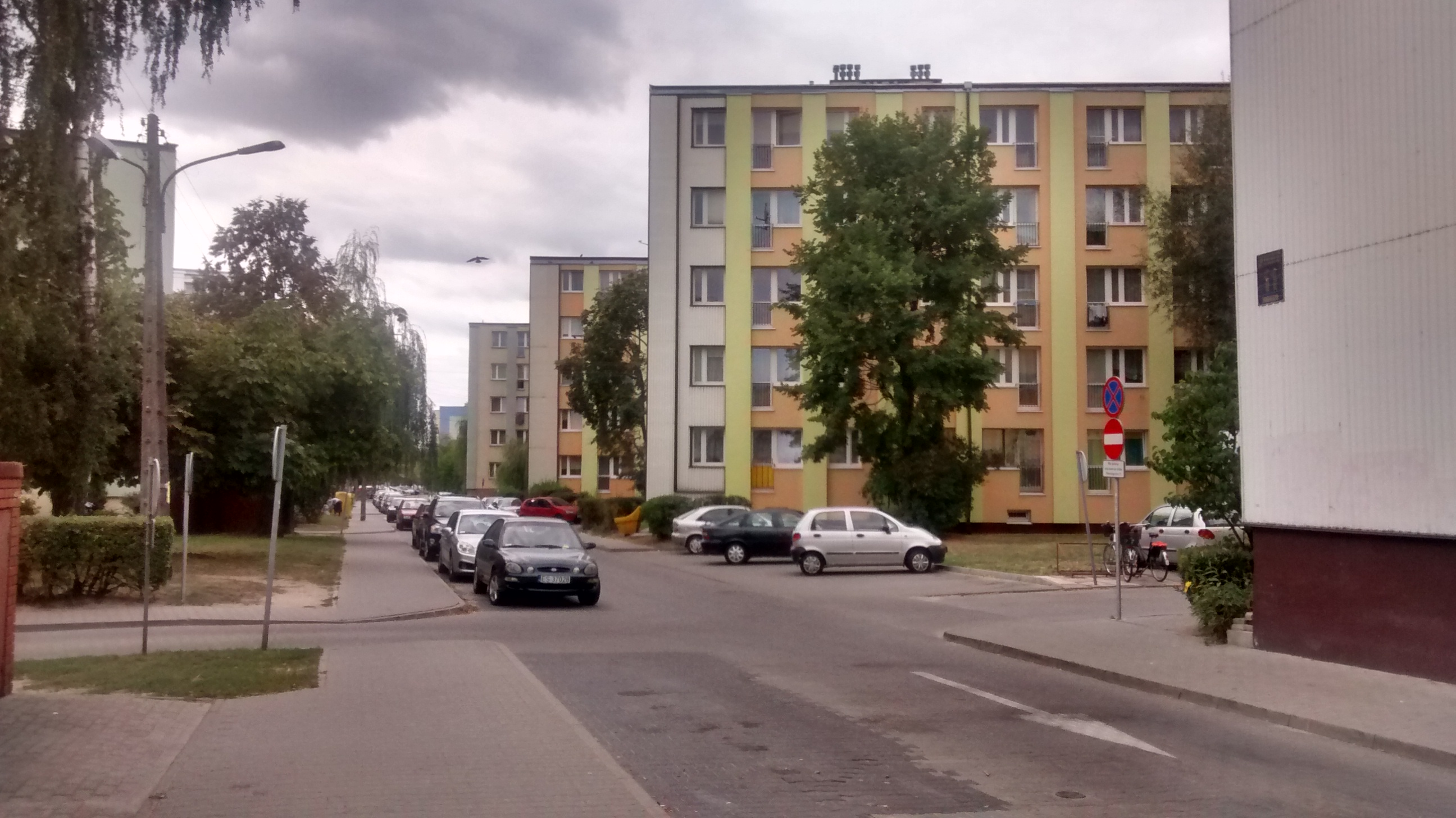 Osiedle 25-lecia PRL przy ul. Pomologicznej